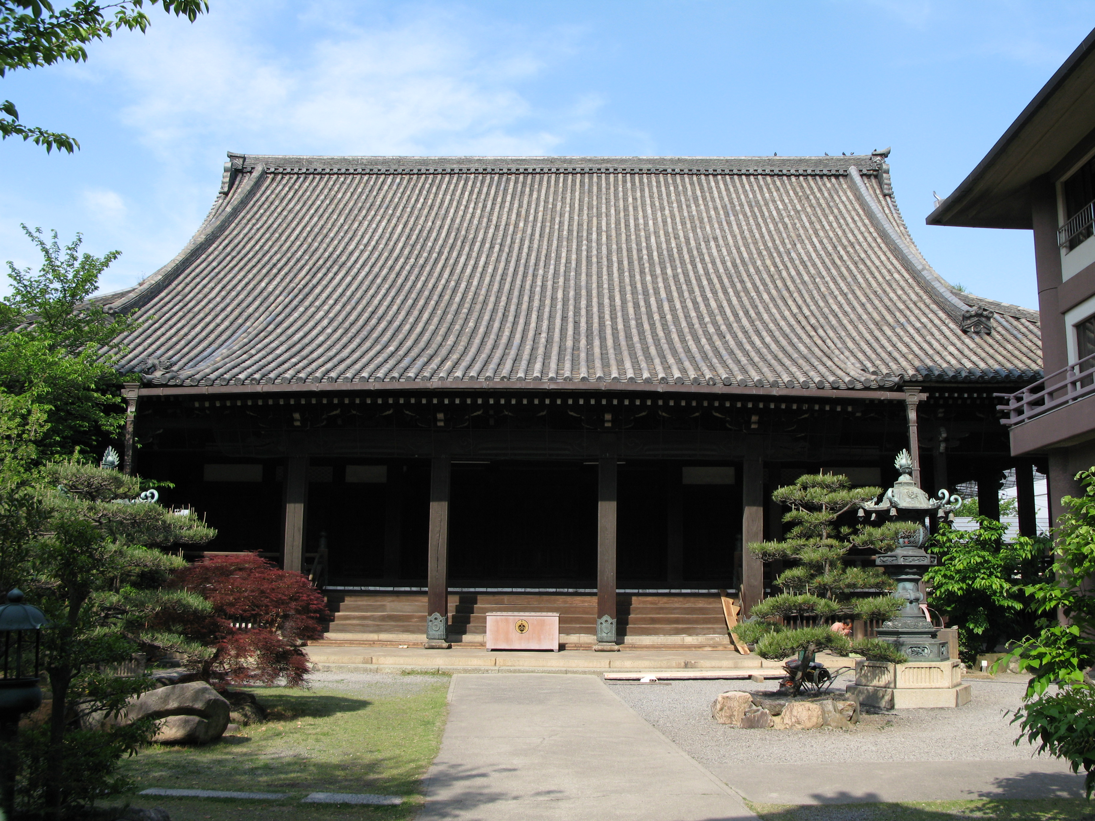 Kenshoji in Yao, Osaka, Japan